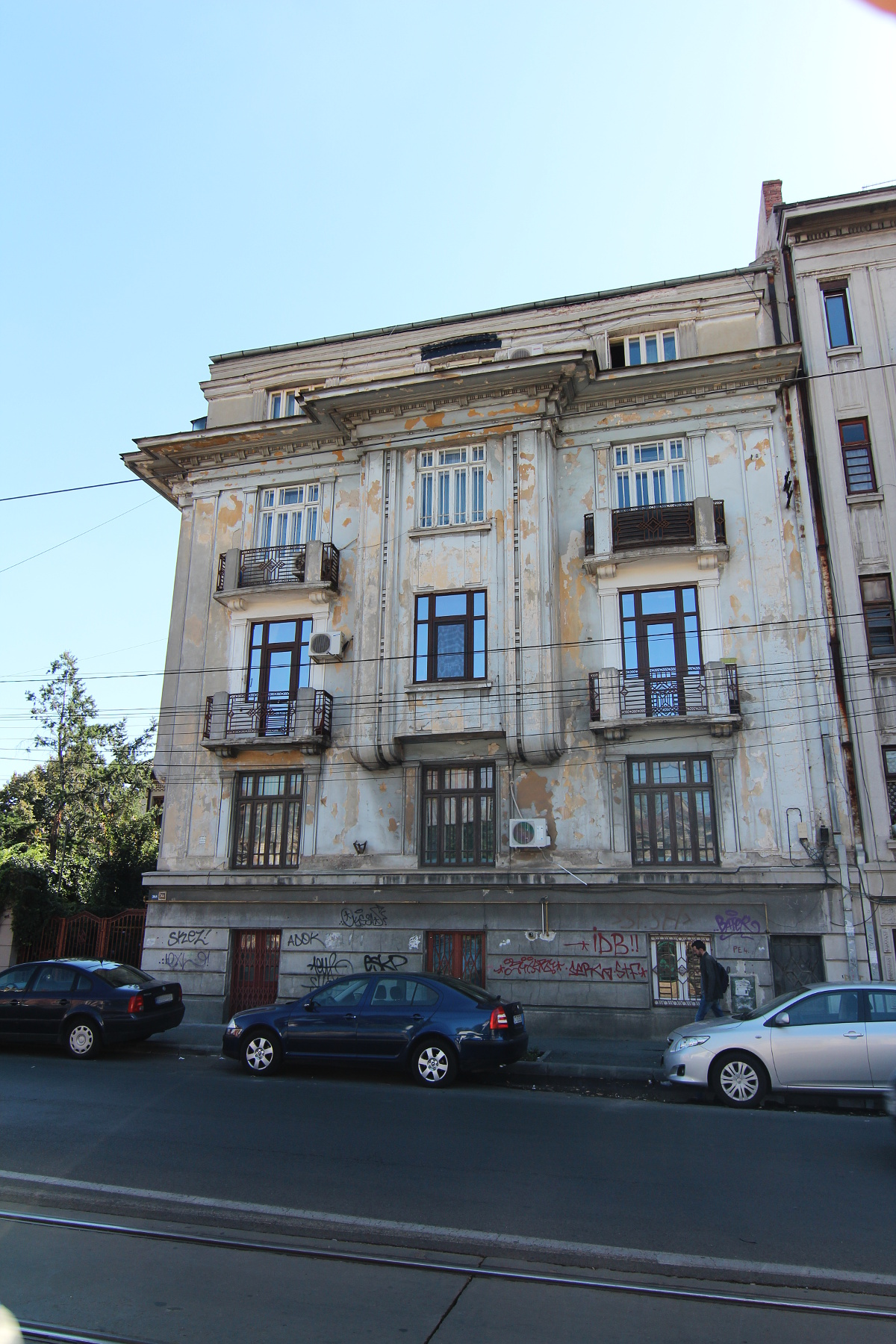 Imobil pe Calea Călărașilor